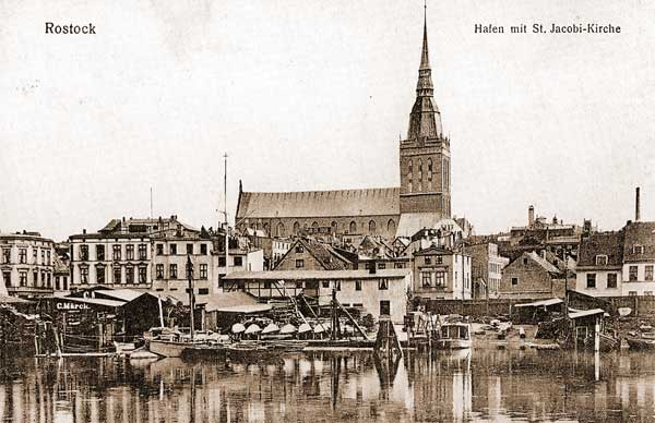 Rostocker Hafen mit St. Jacobi-Kirche Bild aus der Bildsammlung von: Berthold Brinkmann Bild zur gemeinfreien Nutzung genehmigt von: Berthold Brinkmann Entstehungsdatum: um 1900